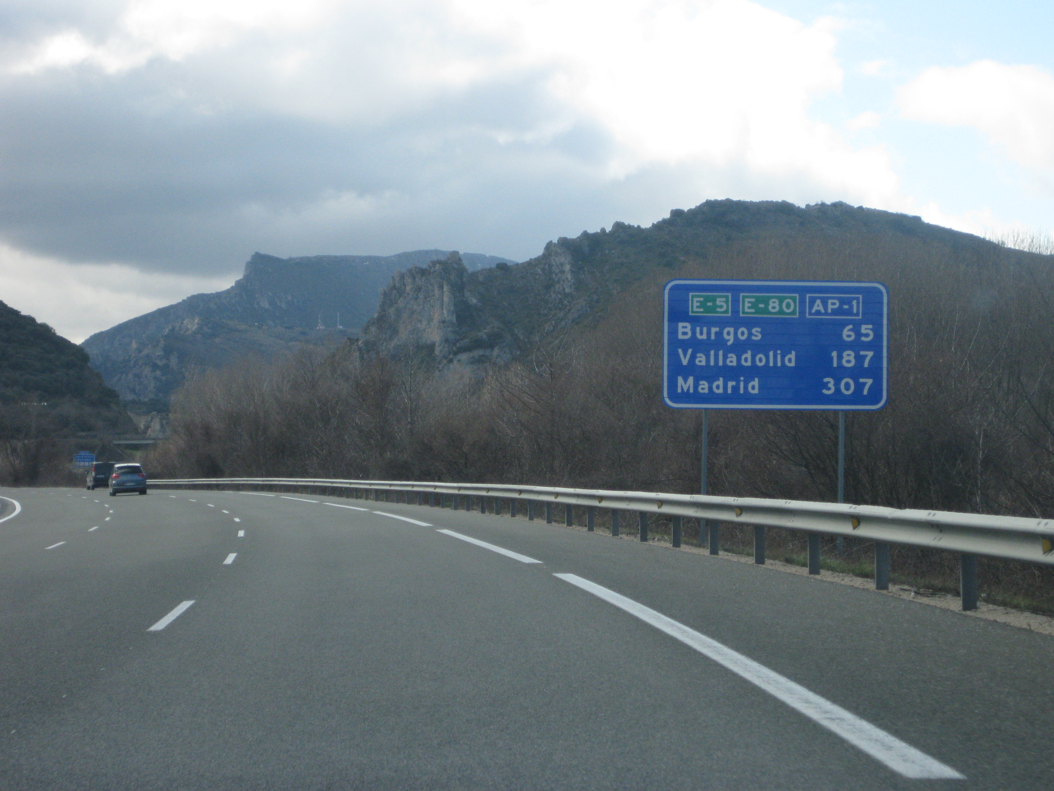 Autopista AP-1 en las cercanías de Ameyugo, Burgos (España).